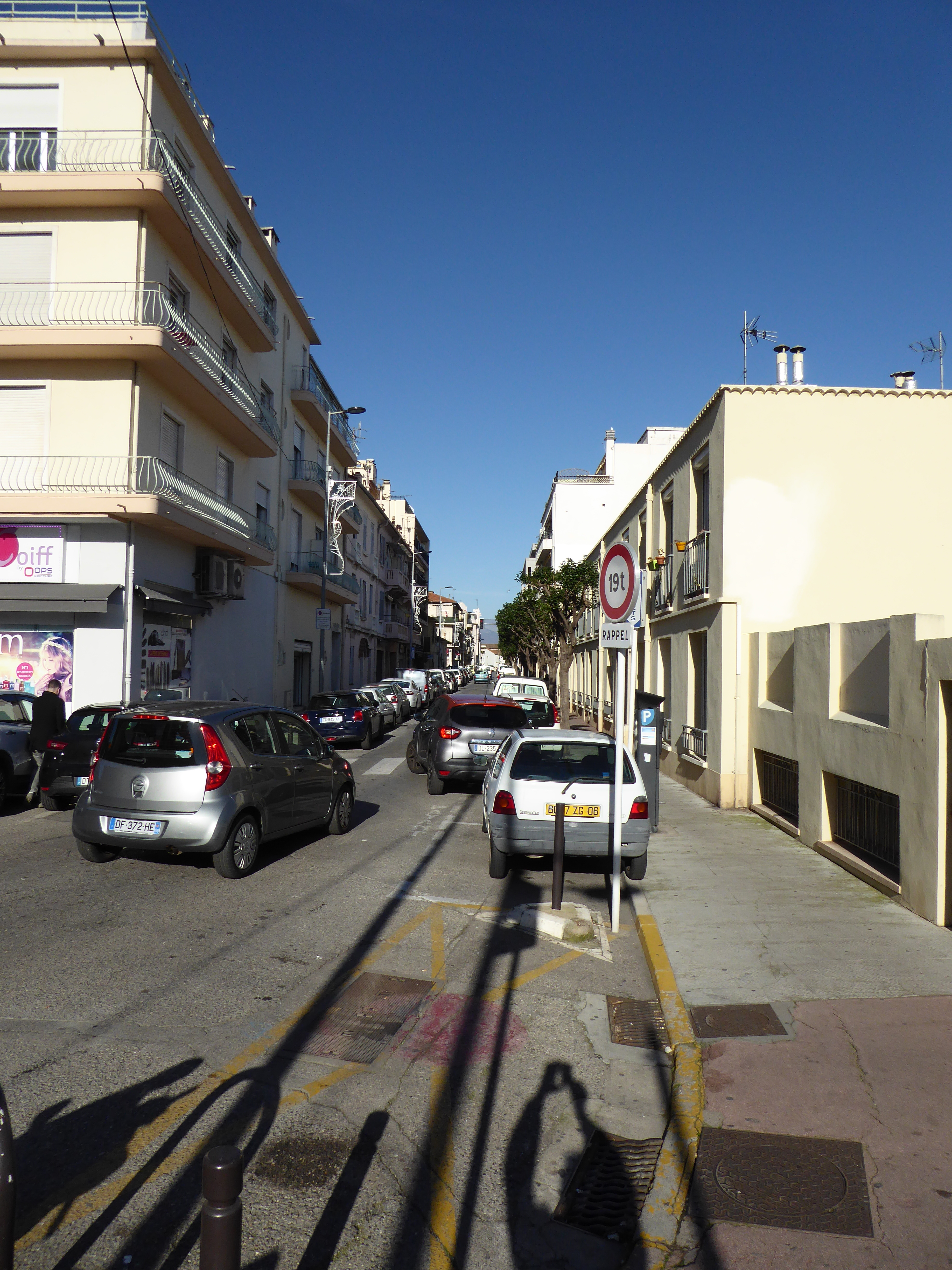 streets in Antibes